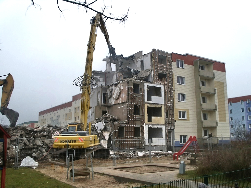 Abriss eines Wohnblocks in Gelbensande - Demolition of a apartment building in Gelbensande